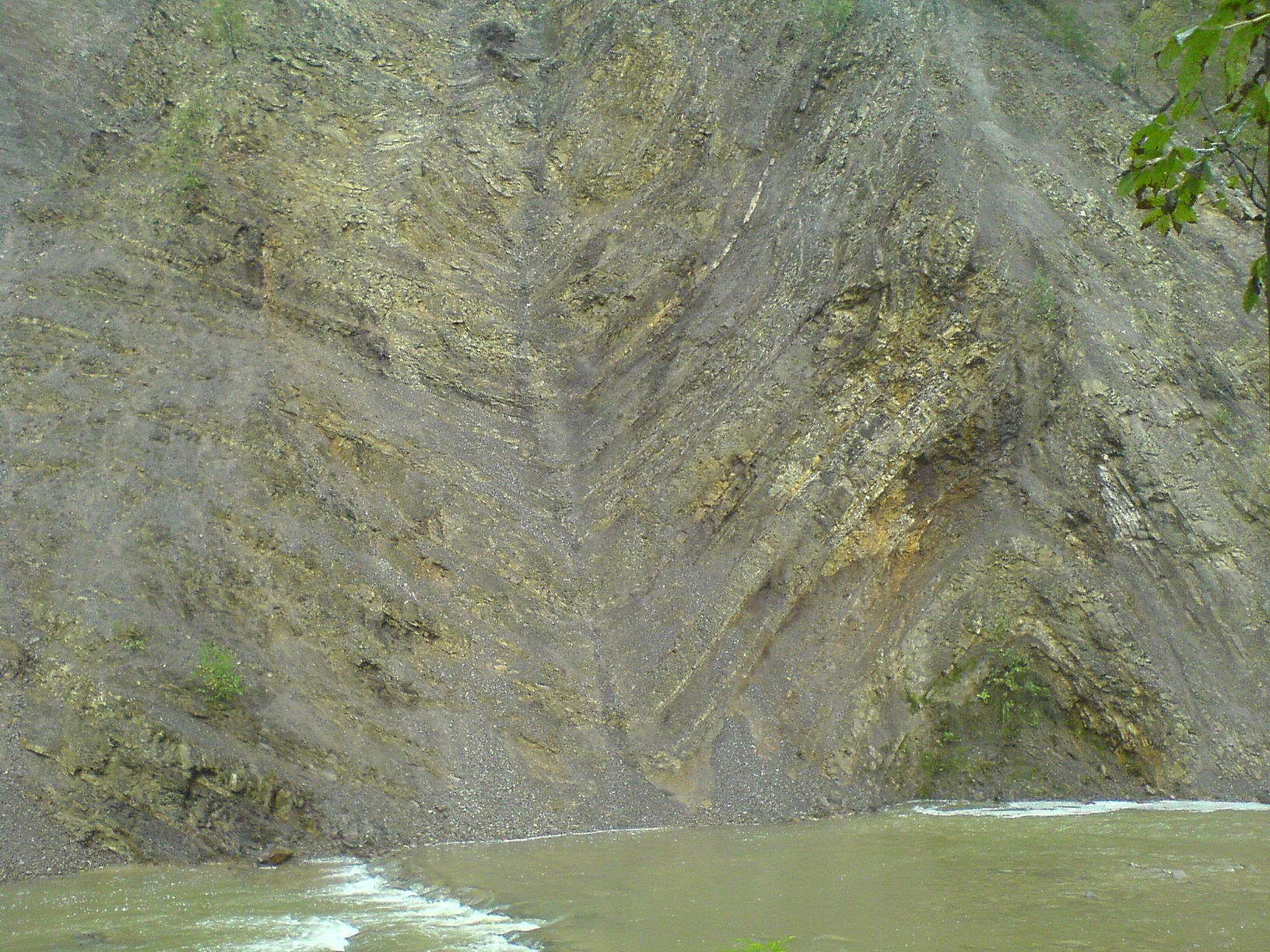 Sładowane osady fliszu karpackiego, odsłonięcie Rymanówka, okolice rzeszowa